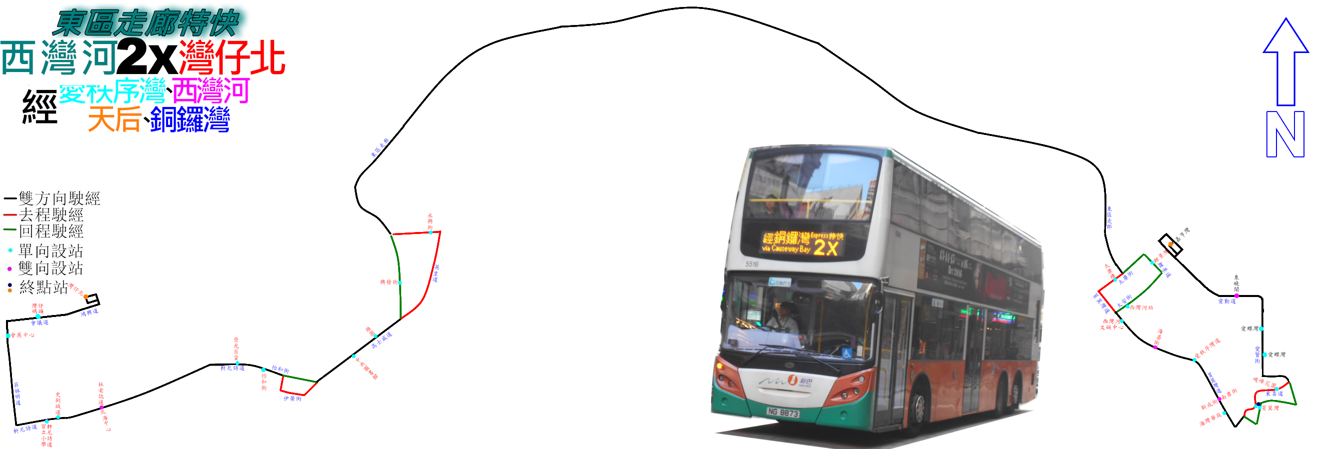 中文（香港）: 新巴2X線的走線圖